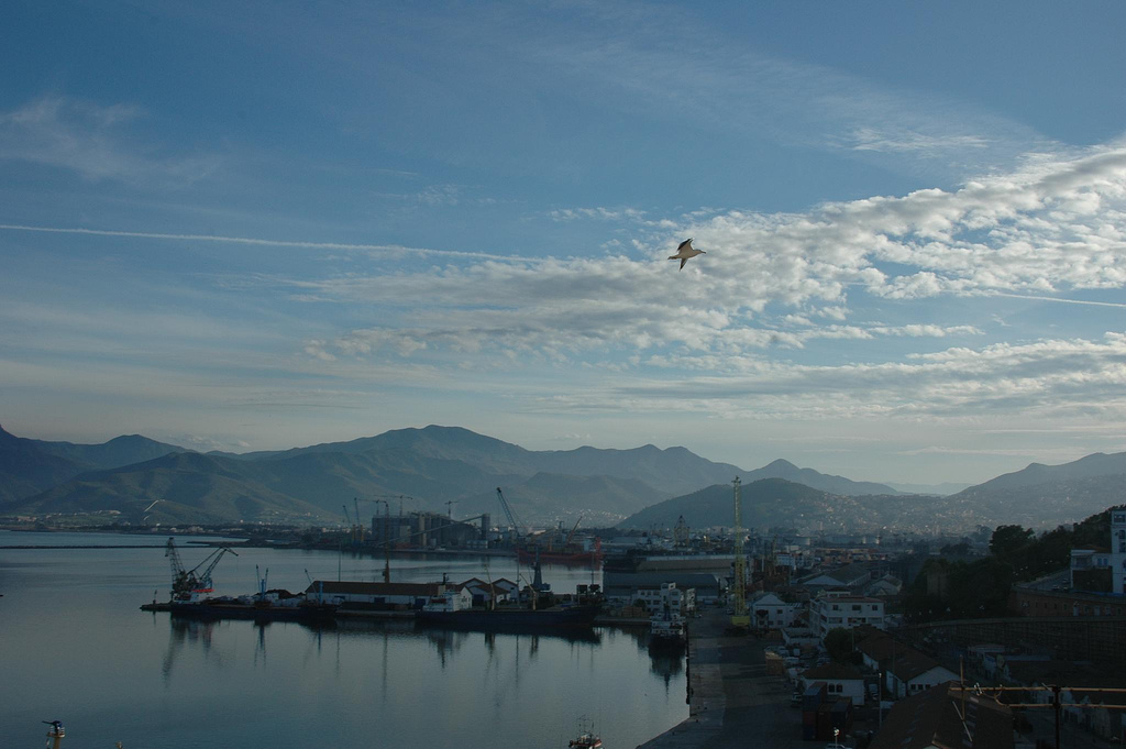 Vue sur la baie de Béjaïa et les montagnes de Kabylie en arrière plan.